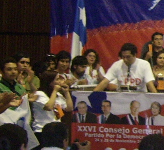 El Secretario General de la JPPD Francisco Estrada en el XXVI Consejo Gral. del Partido.